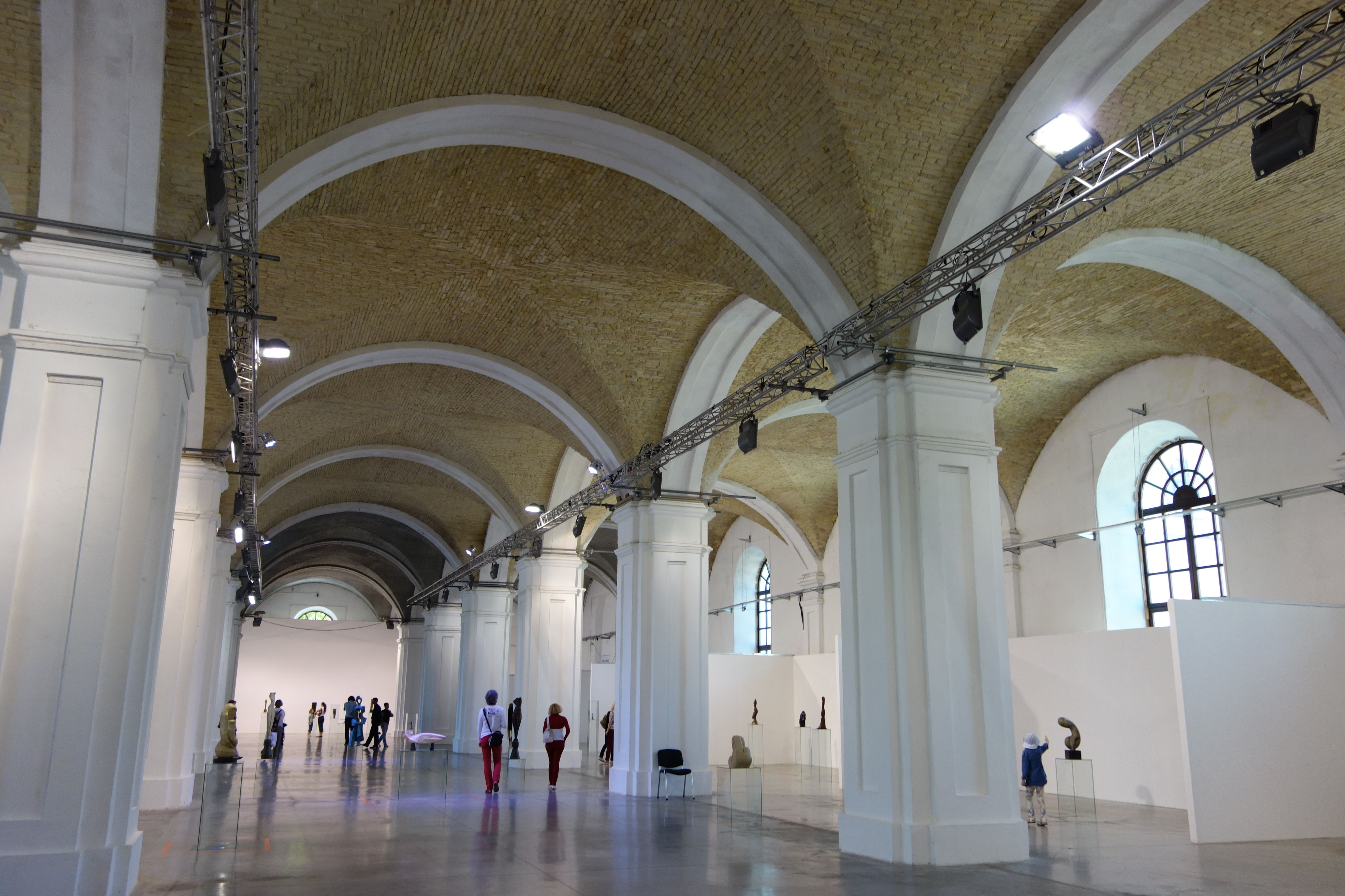 Національний культурно-мистецький та музейний комплекс «Мистецький арсенал»